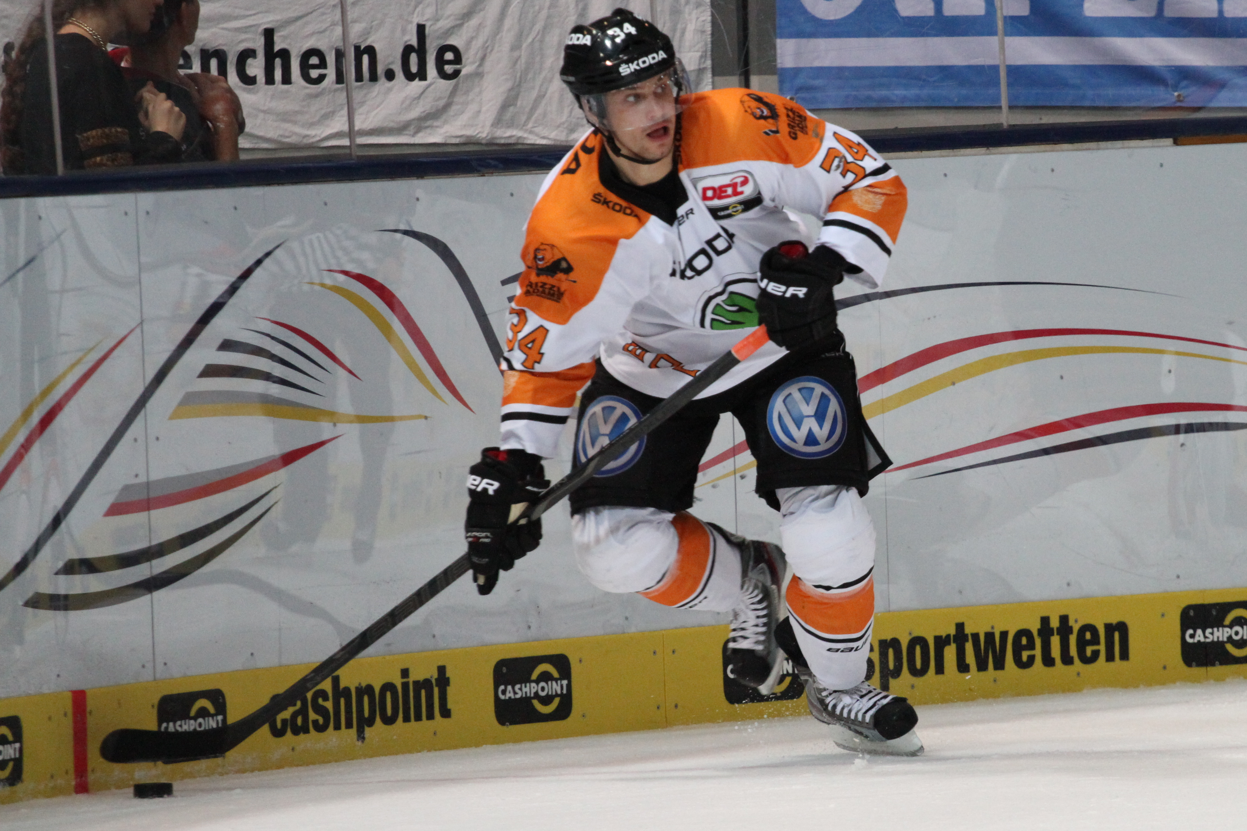 Benedikt Kohl am Puck.